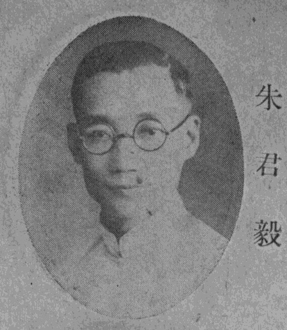 中文（台灣）: 朱君毅肖像